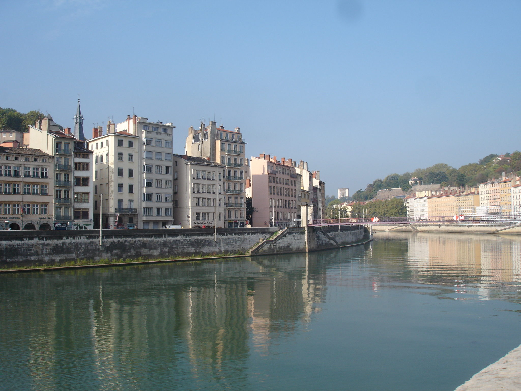 Lyon : quais de Bondy et Pierre Scize